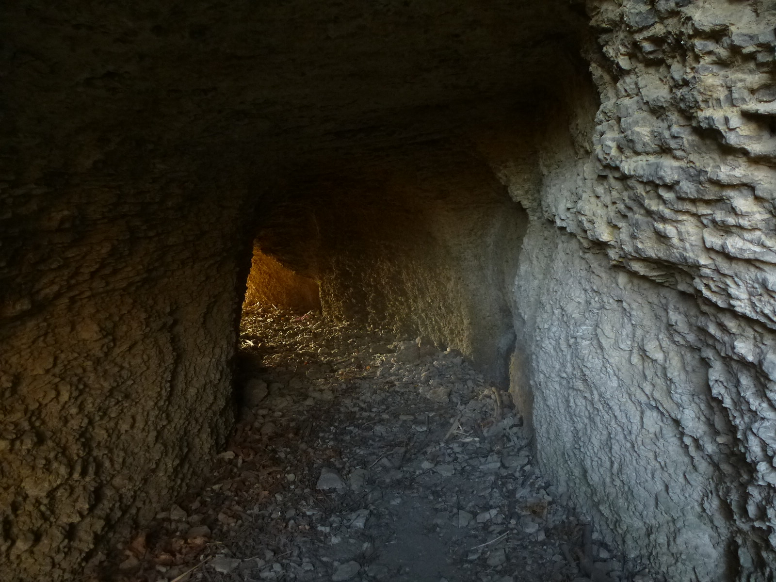 eins von den Überresten der alten königlichen Burg Kirchberg auf dem Hausberg bei Jena